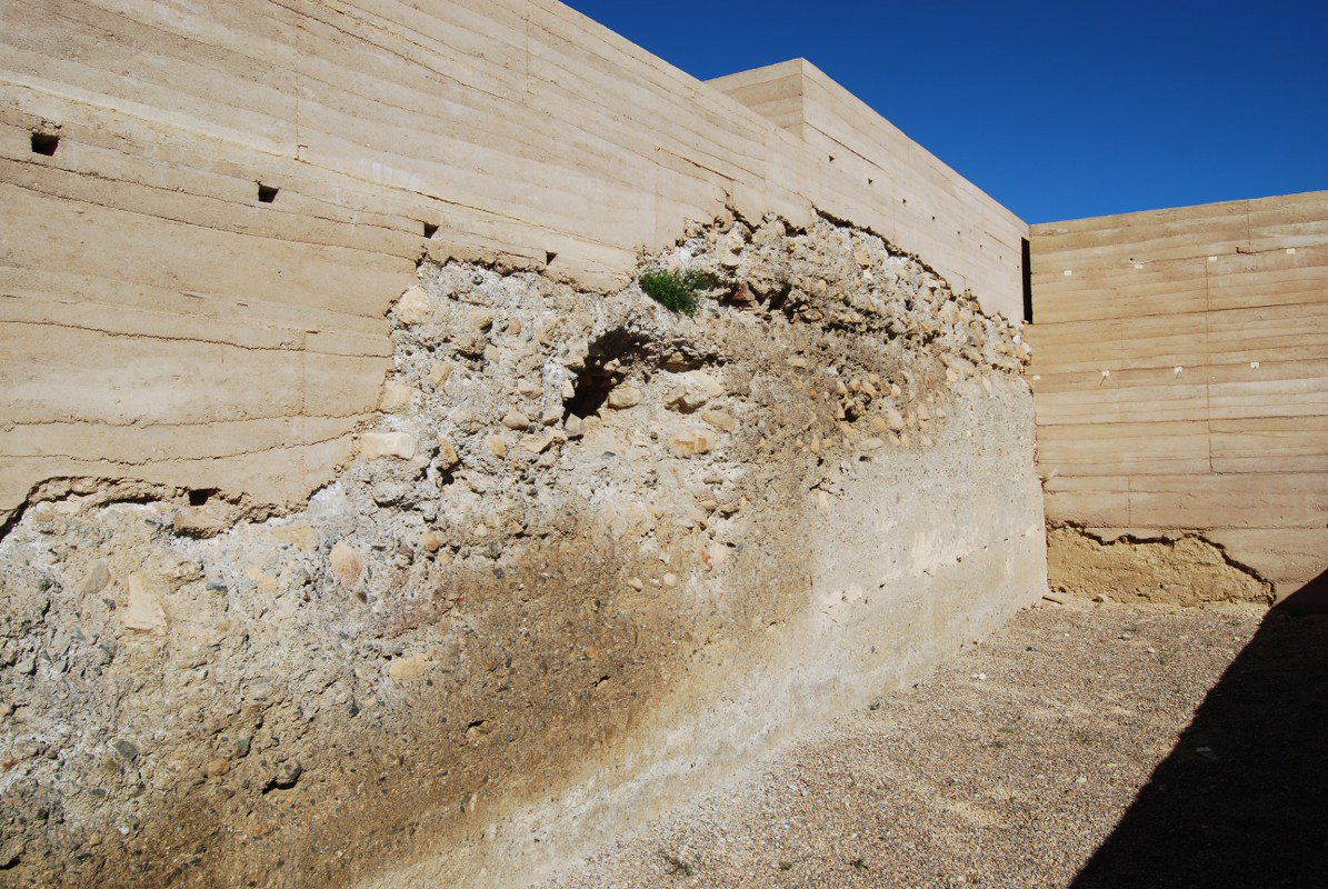 Detalle de uno de los muros del Castillo de Nogalte donde se aprecia la parte original y la parte restaurada